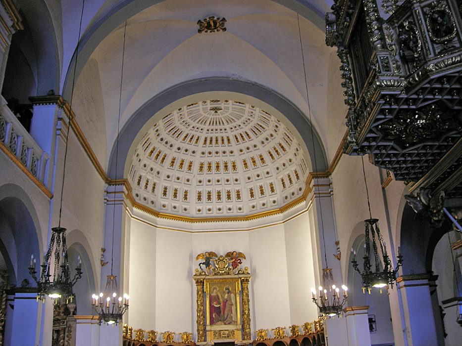 Inneres der Iglesia de San Bartolomé y Santa Tecla in Sitges